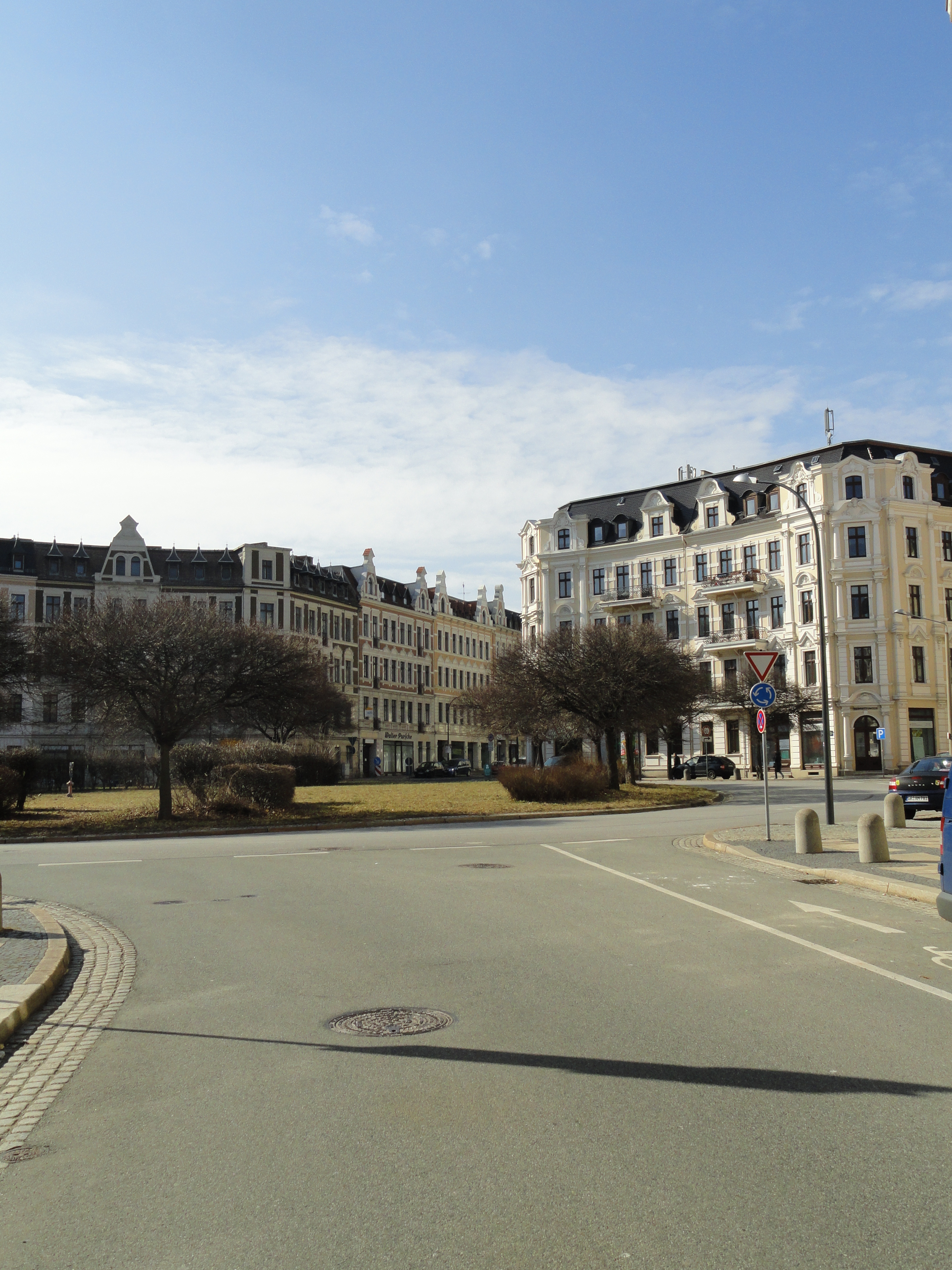 Brautwiesenplatz, Blick in Richtung Brautwiesenstraße in Görlitz